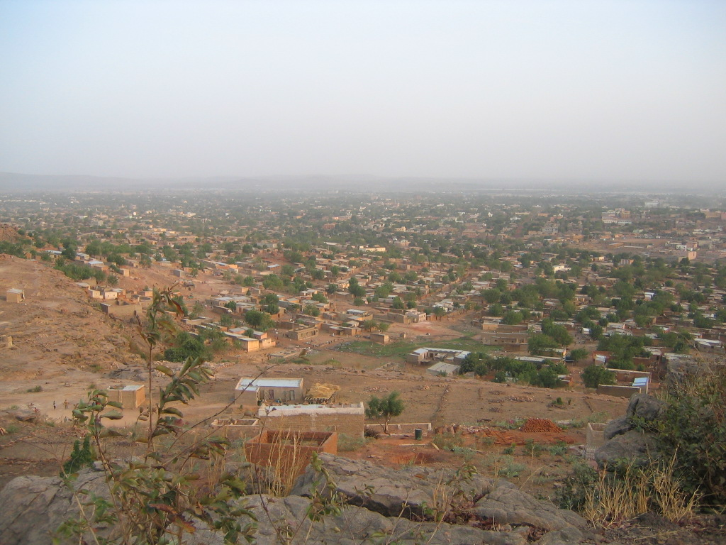 View over Bamako